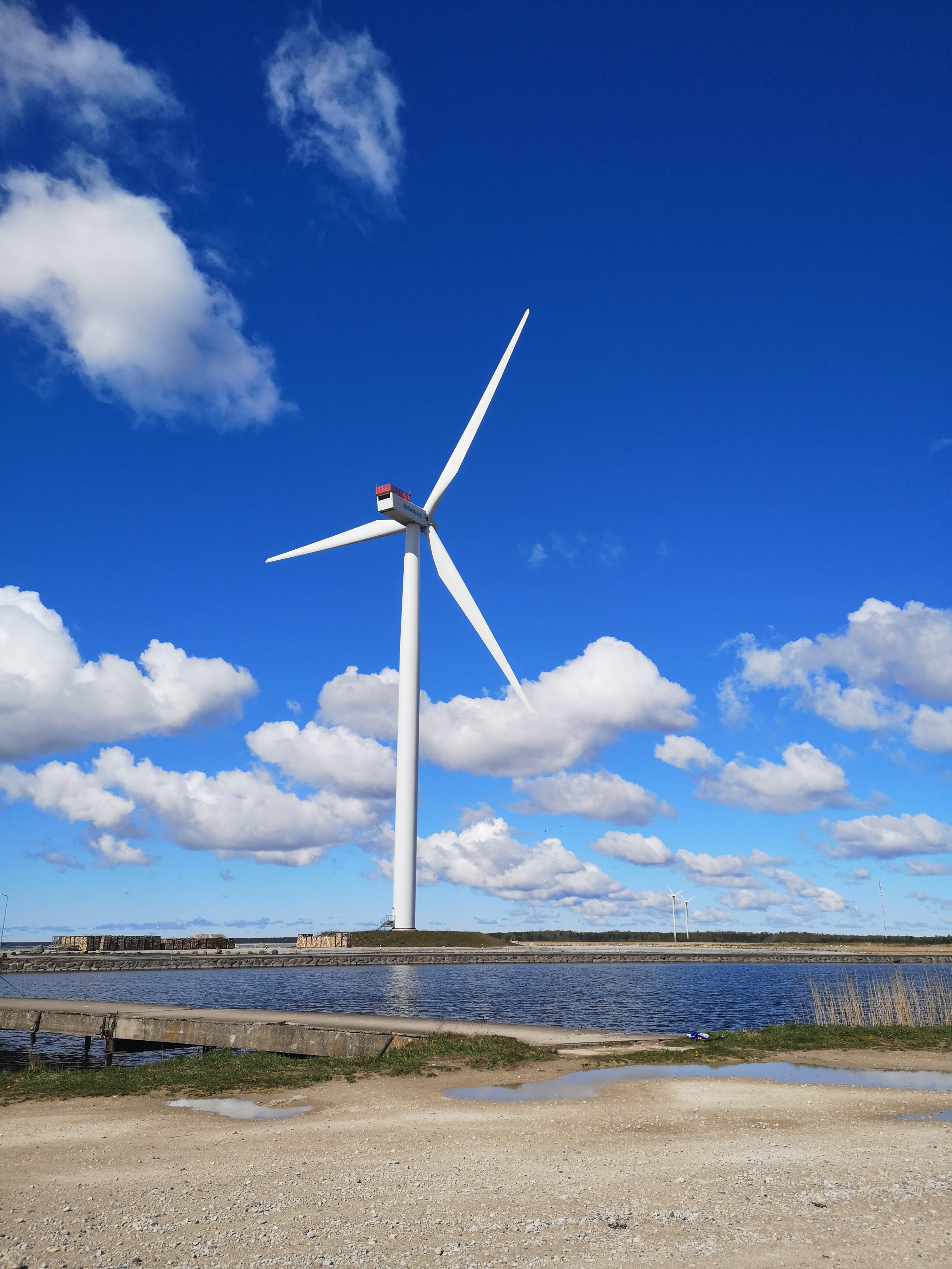 Nasva tuulik